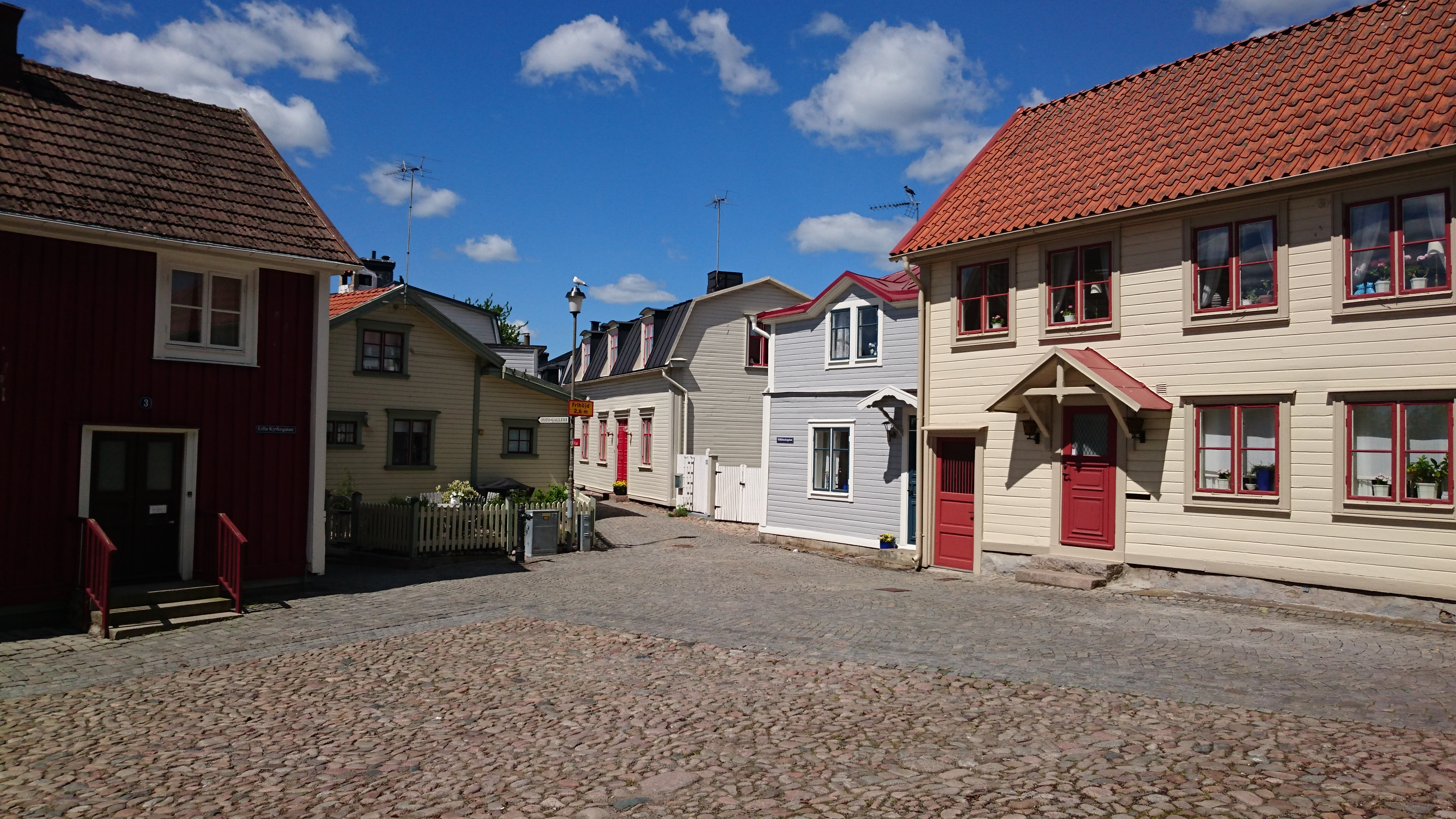 Möllebackstorget, även kallad st. Knuts plats i Ronneby 2017.